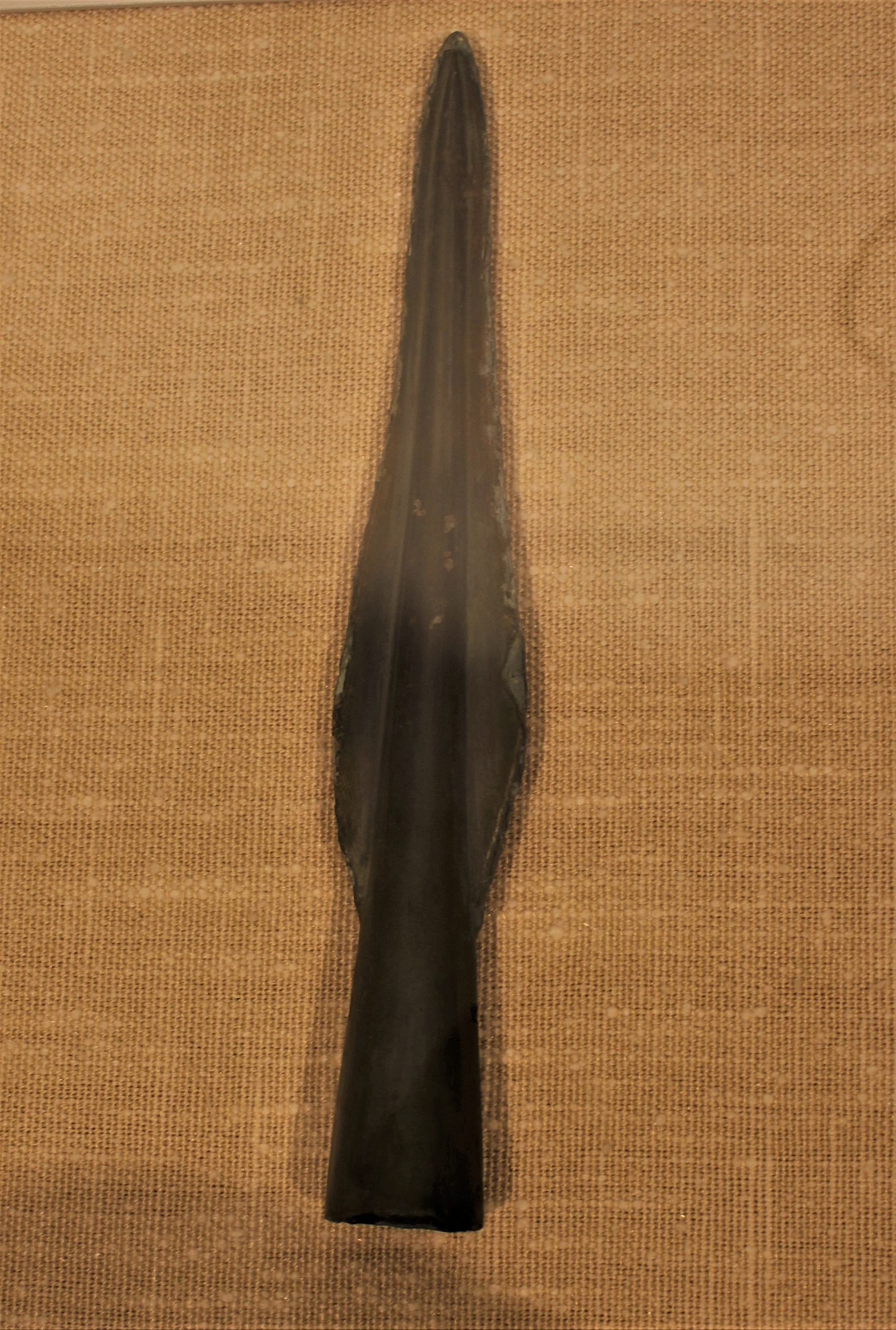 Speerspitze von der Alpe Sücka aus der Bronzezeit, ca. 1200 v. Chr.